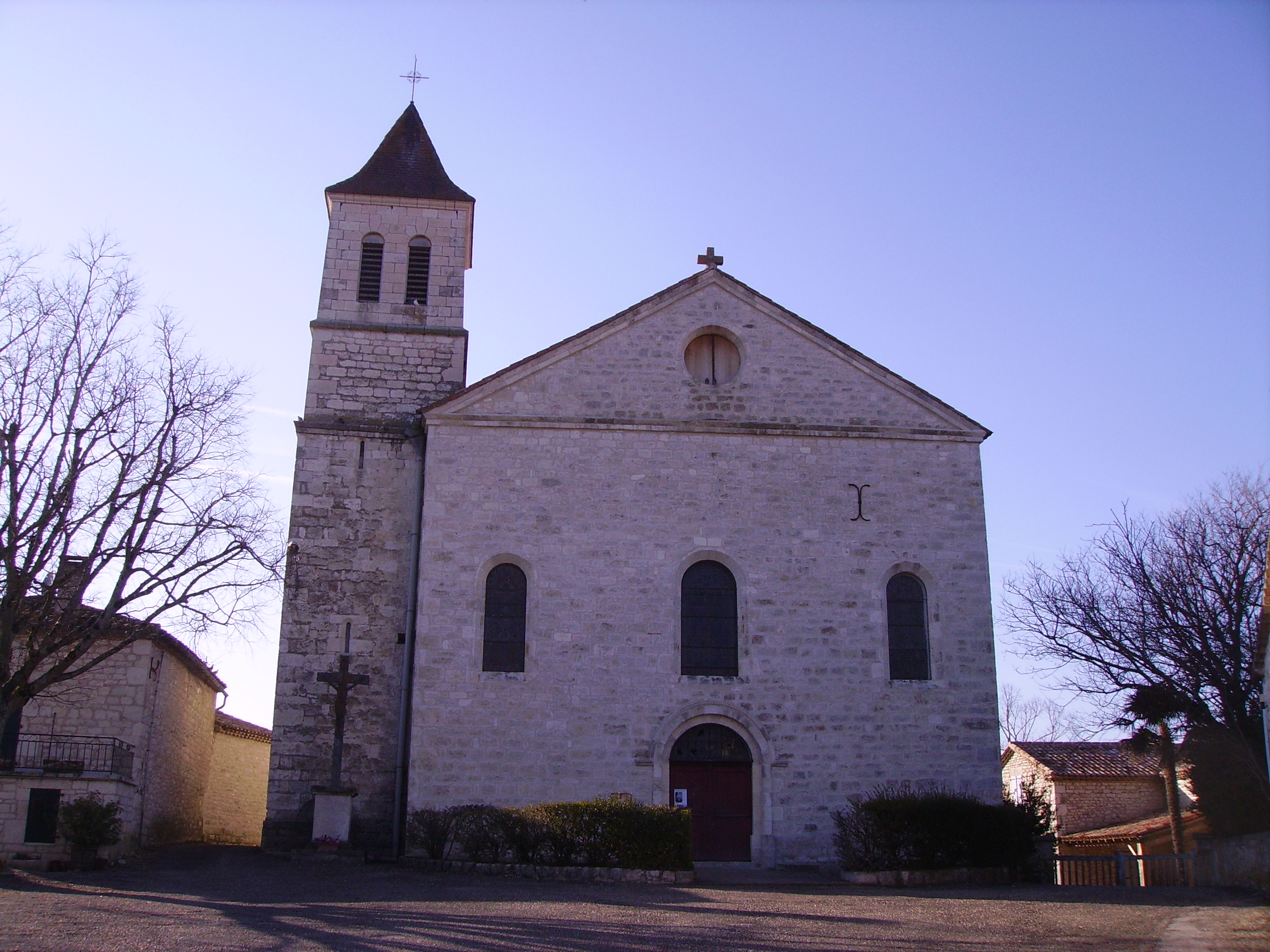 Eglise de St Paul de Loubressac (46-lot)